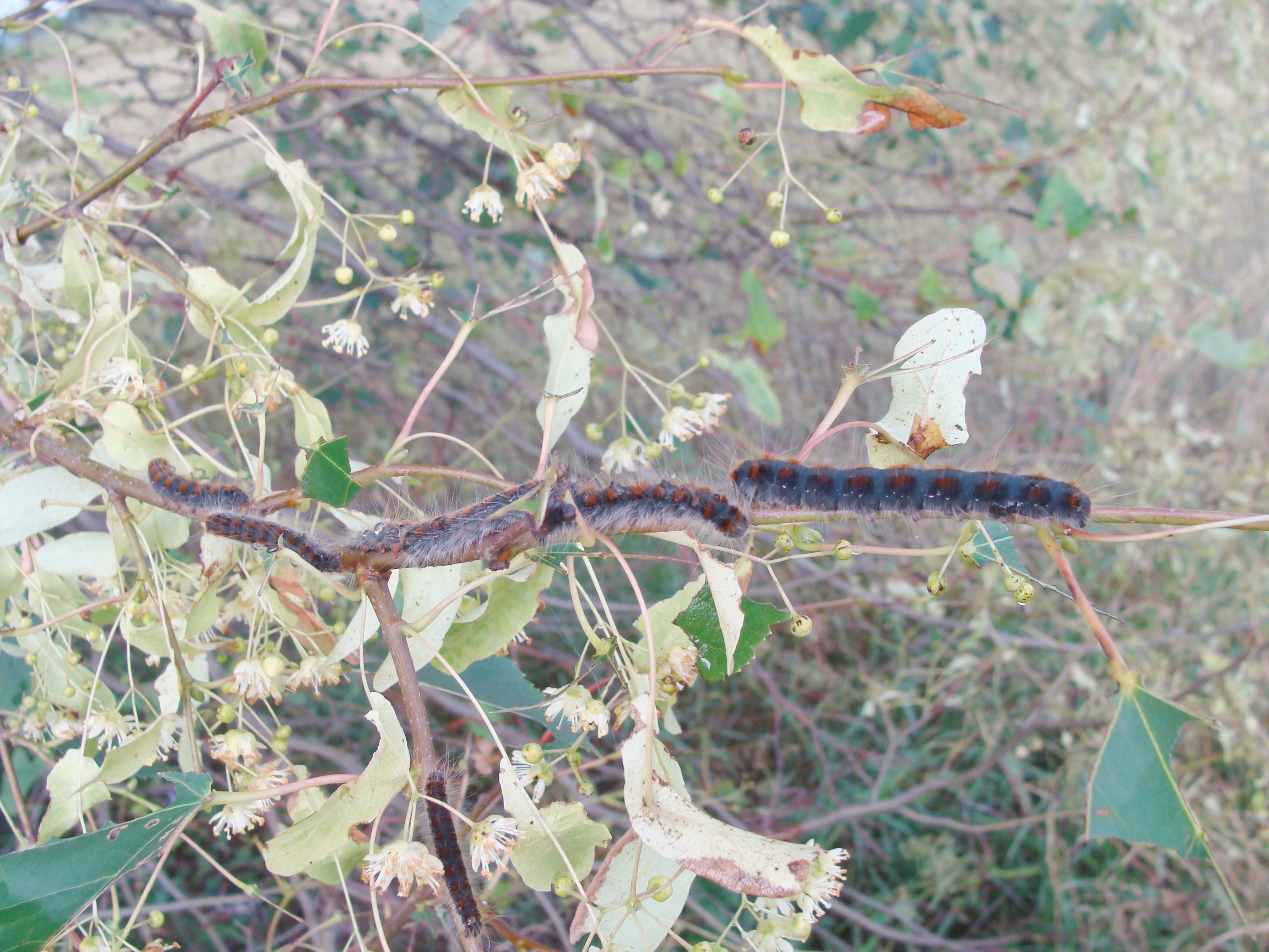 Sprawca gołożeru na drzewie Tilia cordata